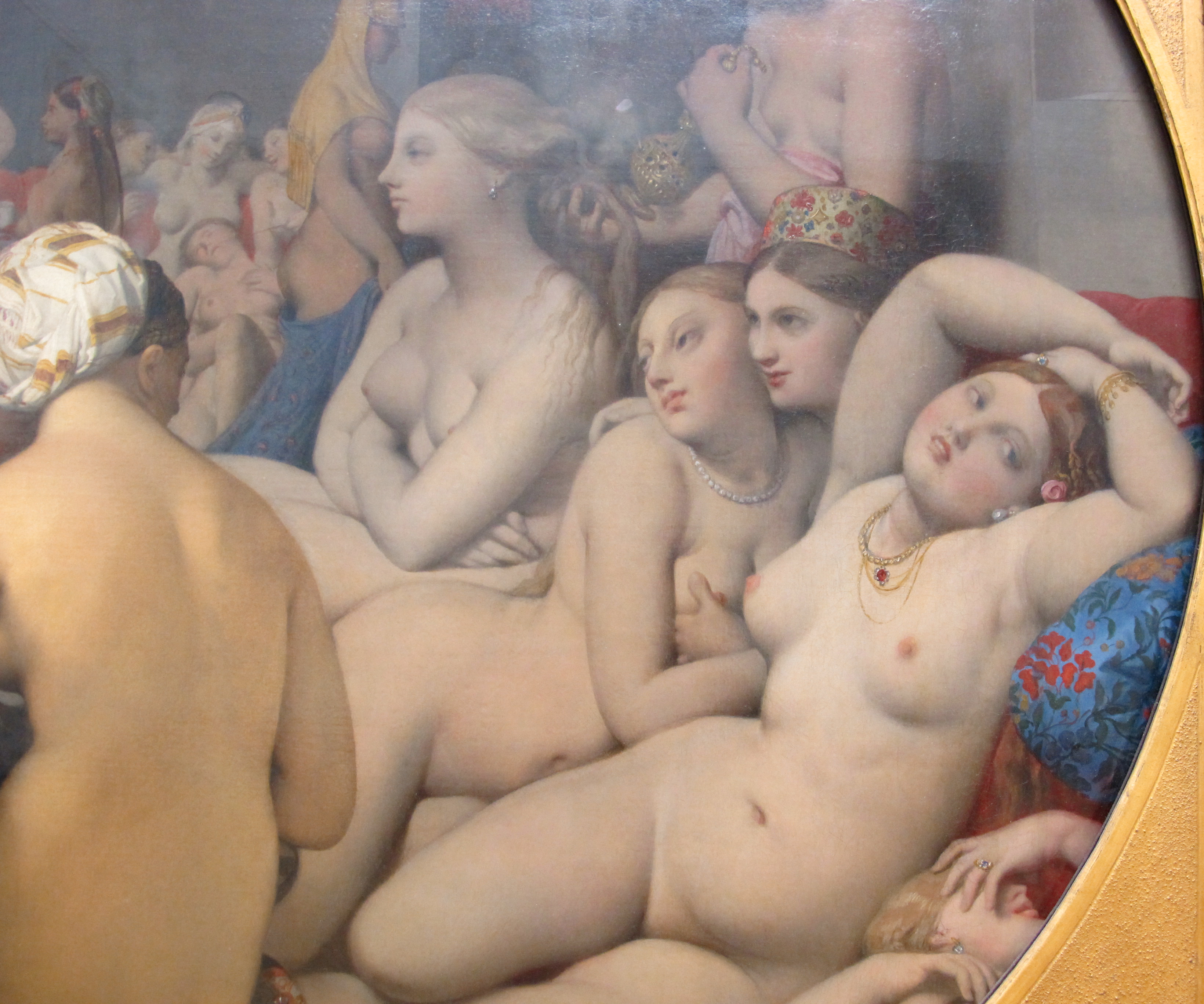 Pittura francese al Louvre, Parigi